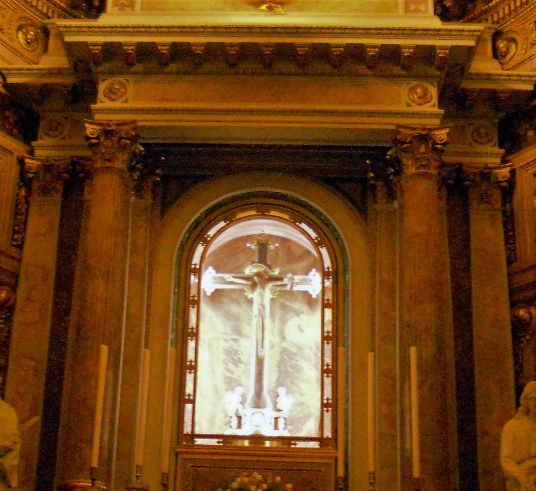 Crocifisso di Rosate - Cappella dell'Eucarestia